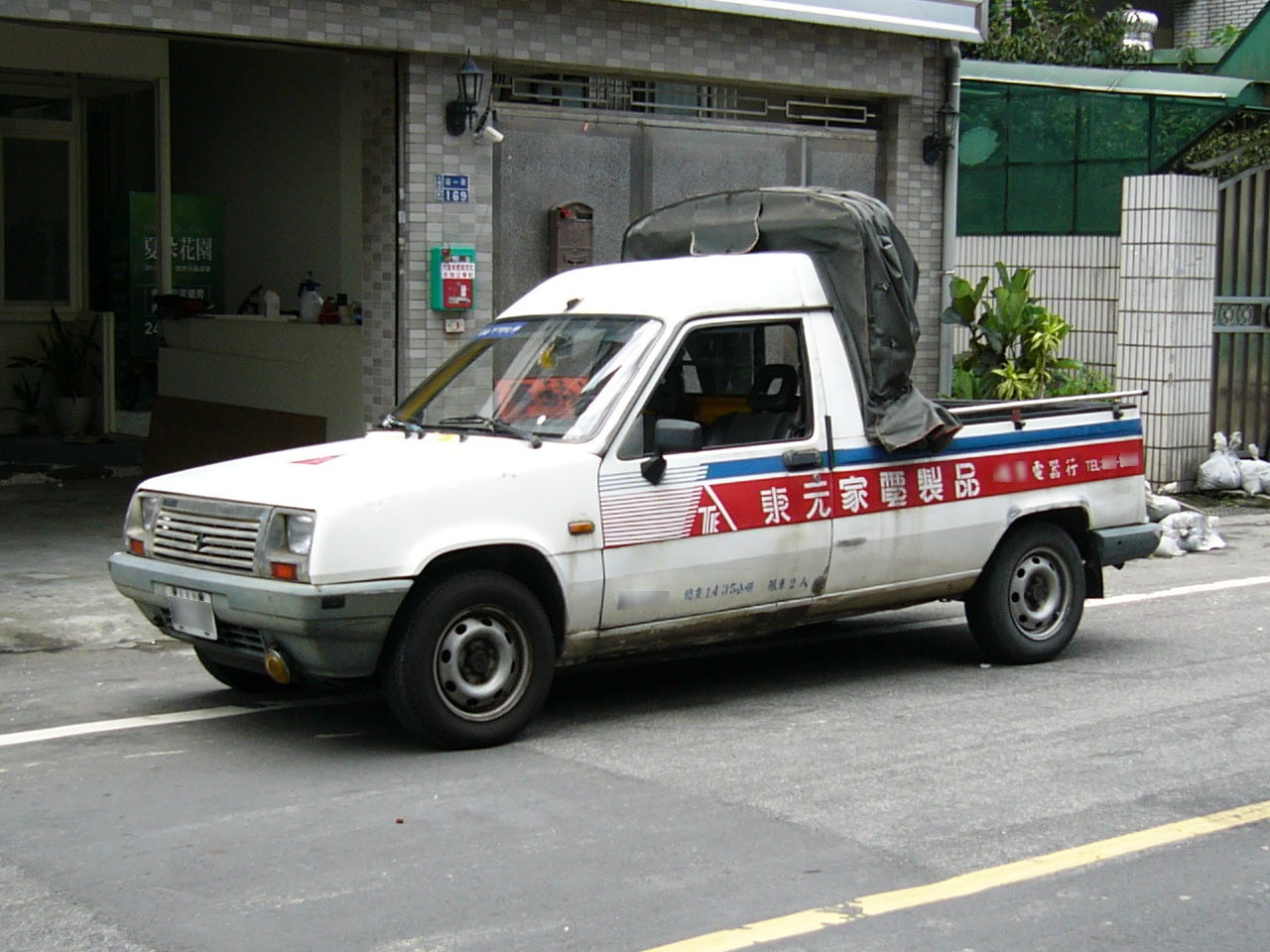 中文（台灣）: 基隆市七堵區福一街169號（大慶車體廣告社）前，1990年代東元電機家電製品經銷商的雷諾紅龍服務車。